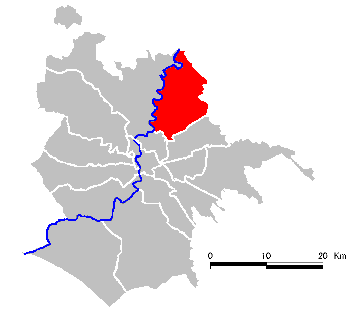 Municipio Roma III